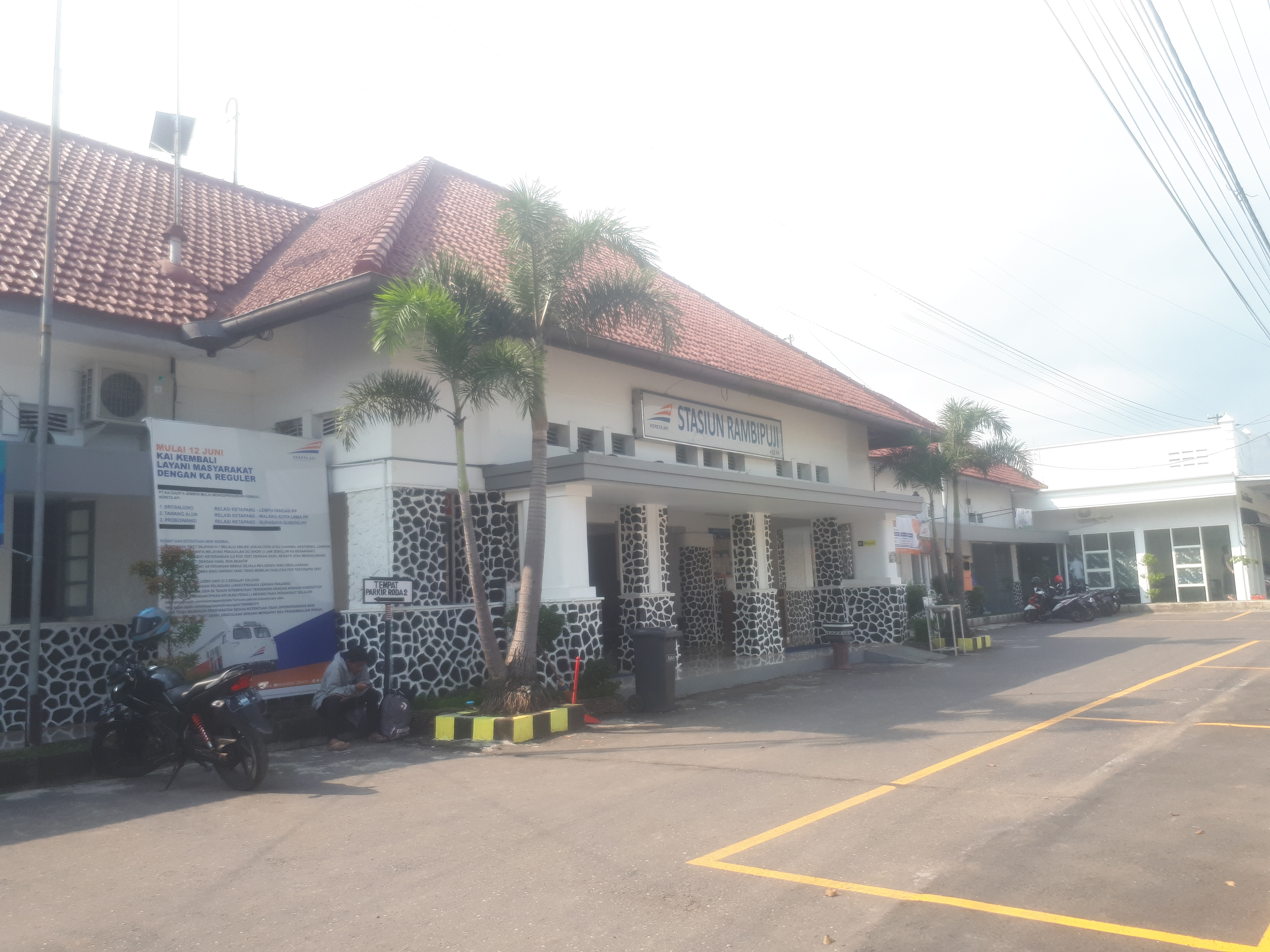 Tampak depan Stasiun Rambipuji, 2020